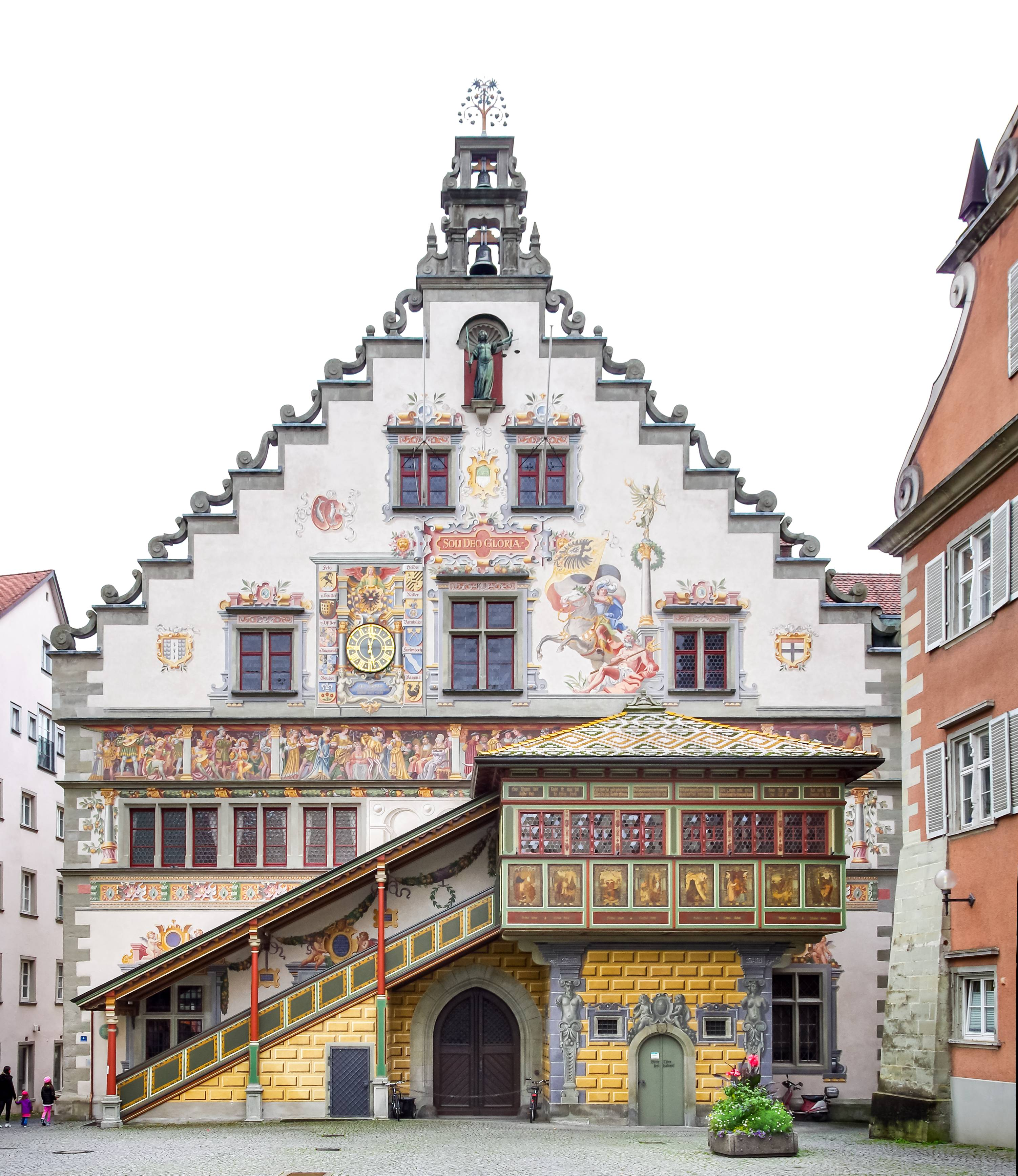 Bilder aus Lindau am Bodensee